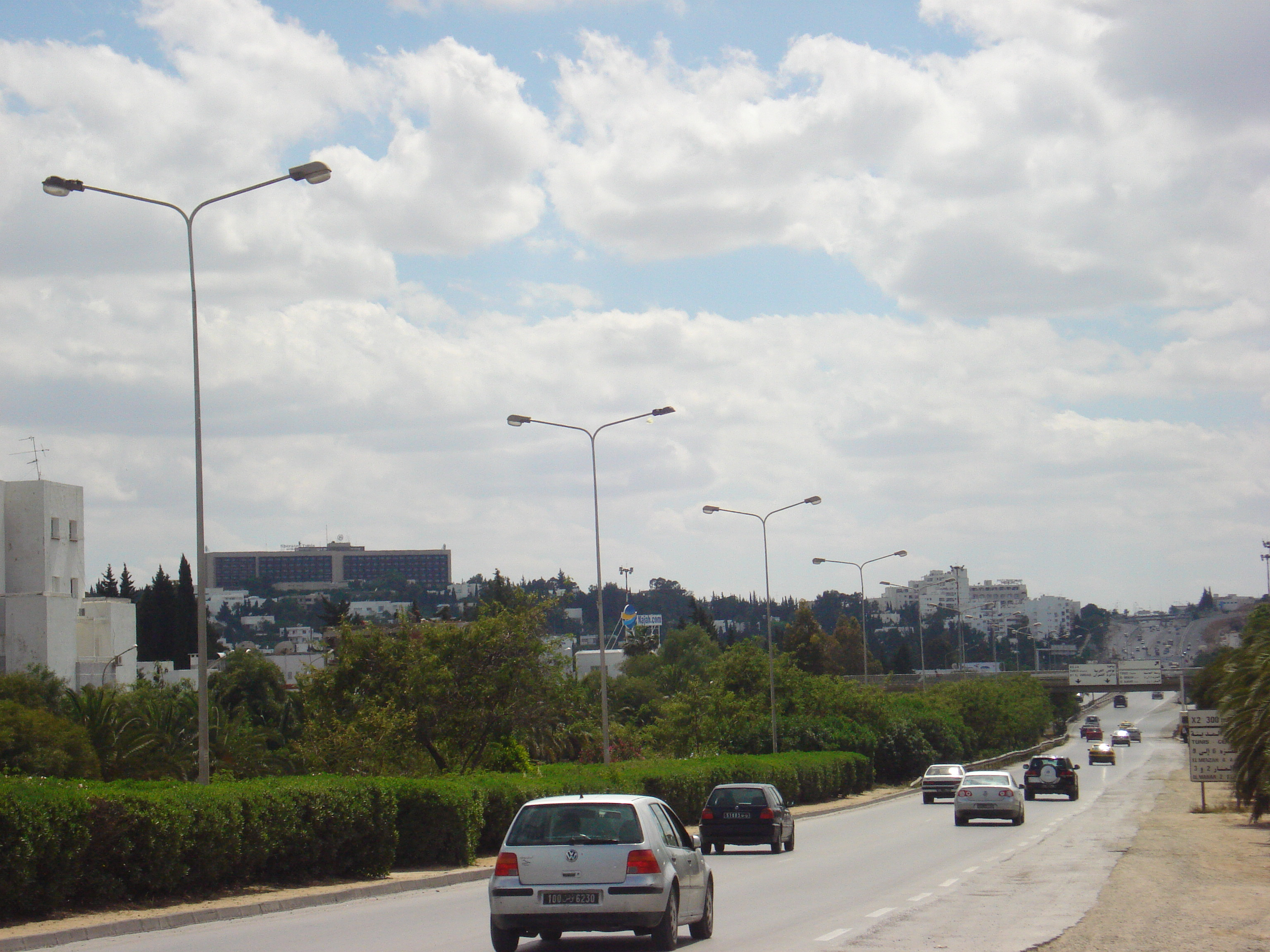 Boulevard Mohamed Bouazizi, rebaptisé du nom de Mohamed Bouazizi, à Tunis (Tunisie)